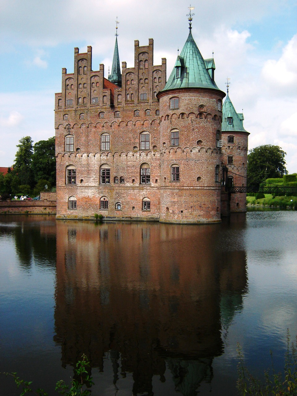 Slot Egeskov, Denemarken